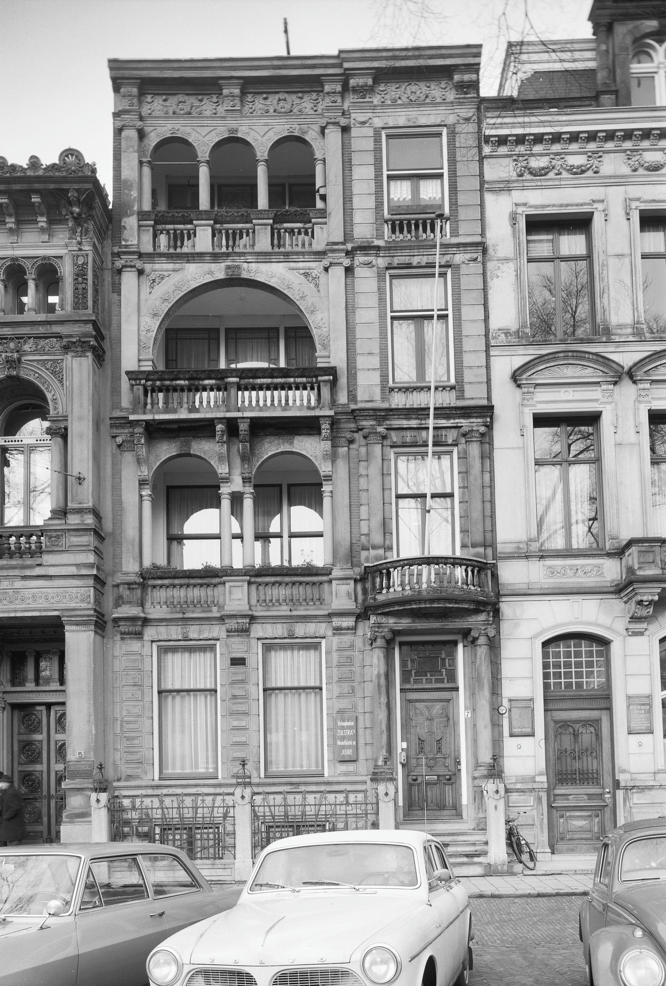 voorgevel